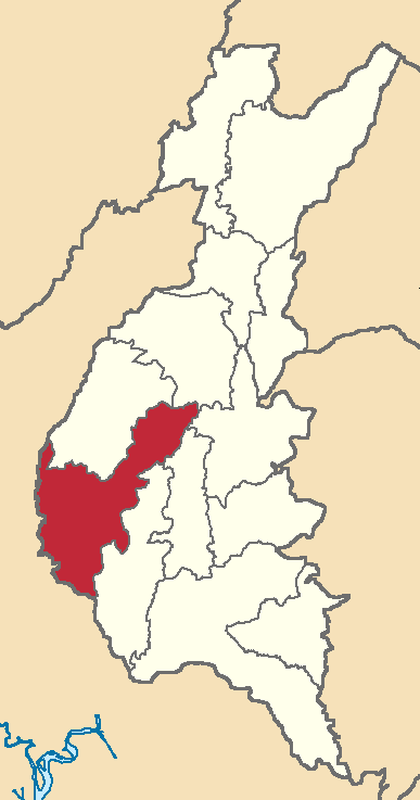 Mapa localizador del cantón en Los Ríos, Ecuador